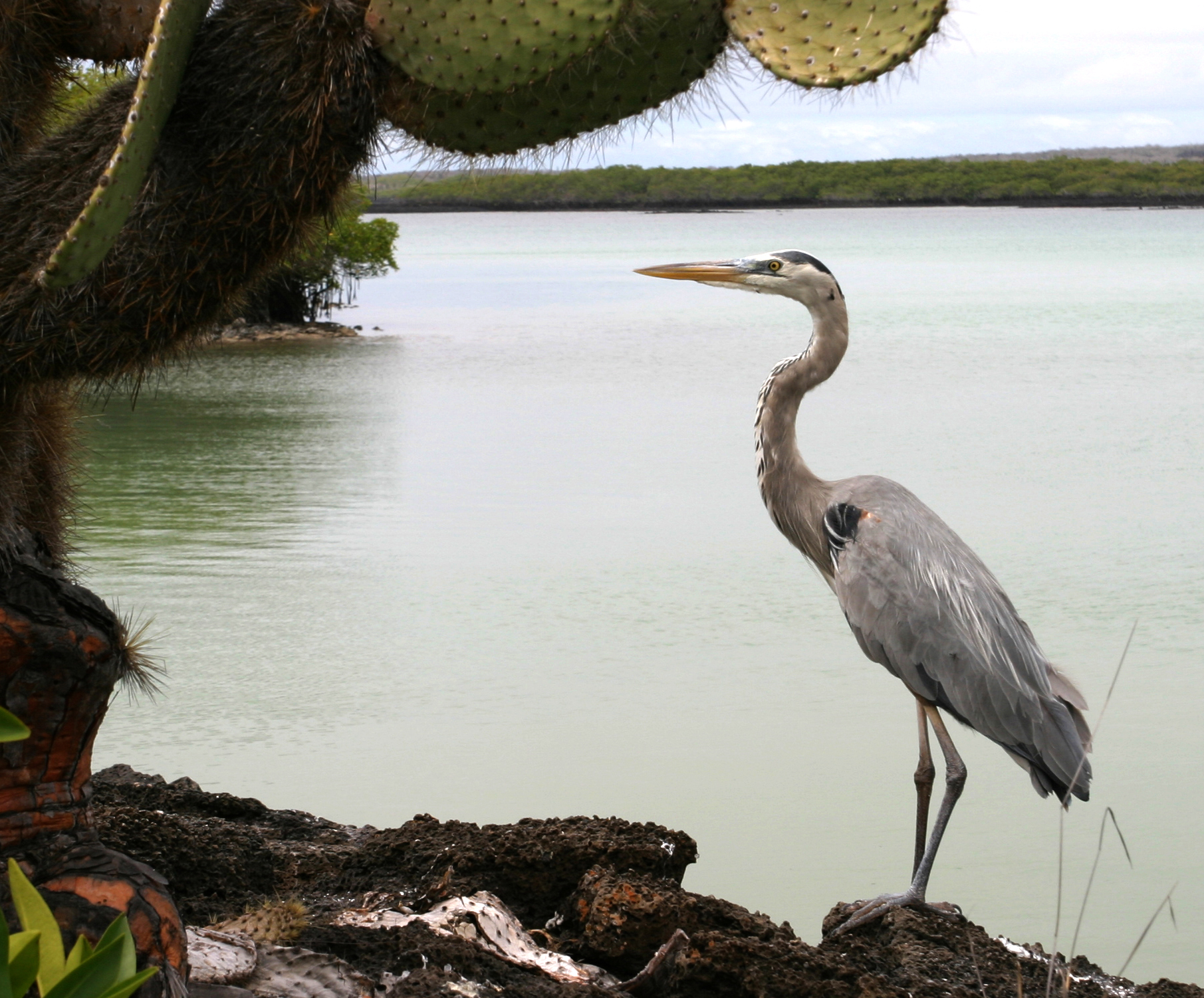 ইগ্রেট জাতীয় বক: বৈজ্ঞানিক নাম--Egretta garzetta.Ardea herodias